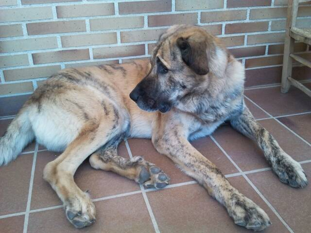 Muestra un ejemplar de Mastín Español, llamado Patapouf y nacido el 30/01/2007